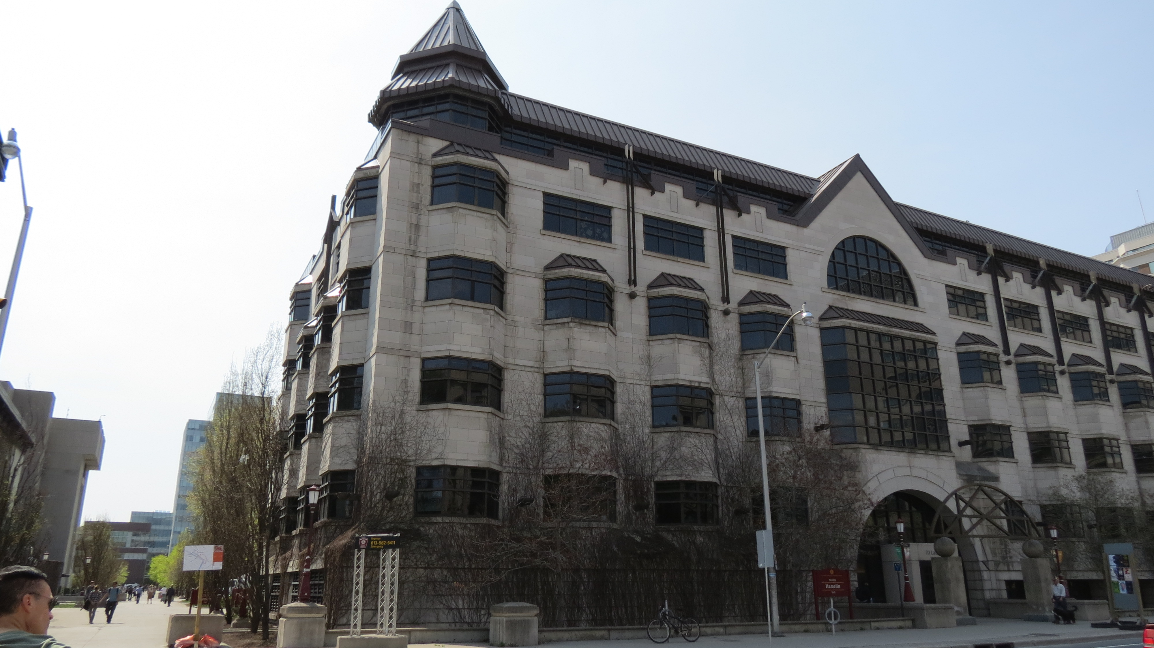 ILOB building